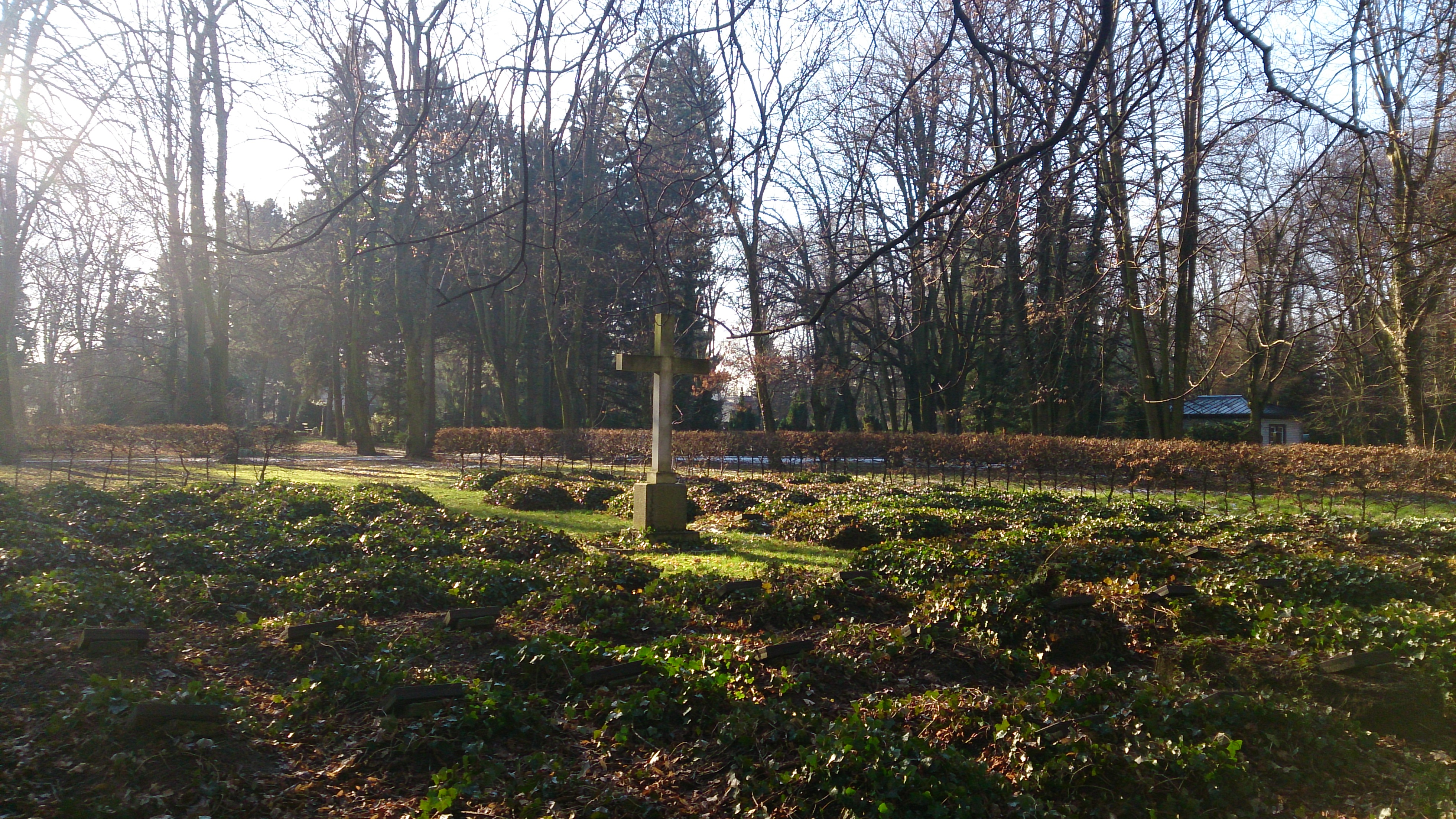 Kirchhof St. Bartholomäus:Gedenkstätte für die Opfer von Krieg und Gewaltherrschaft.